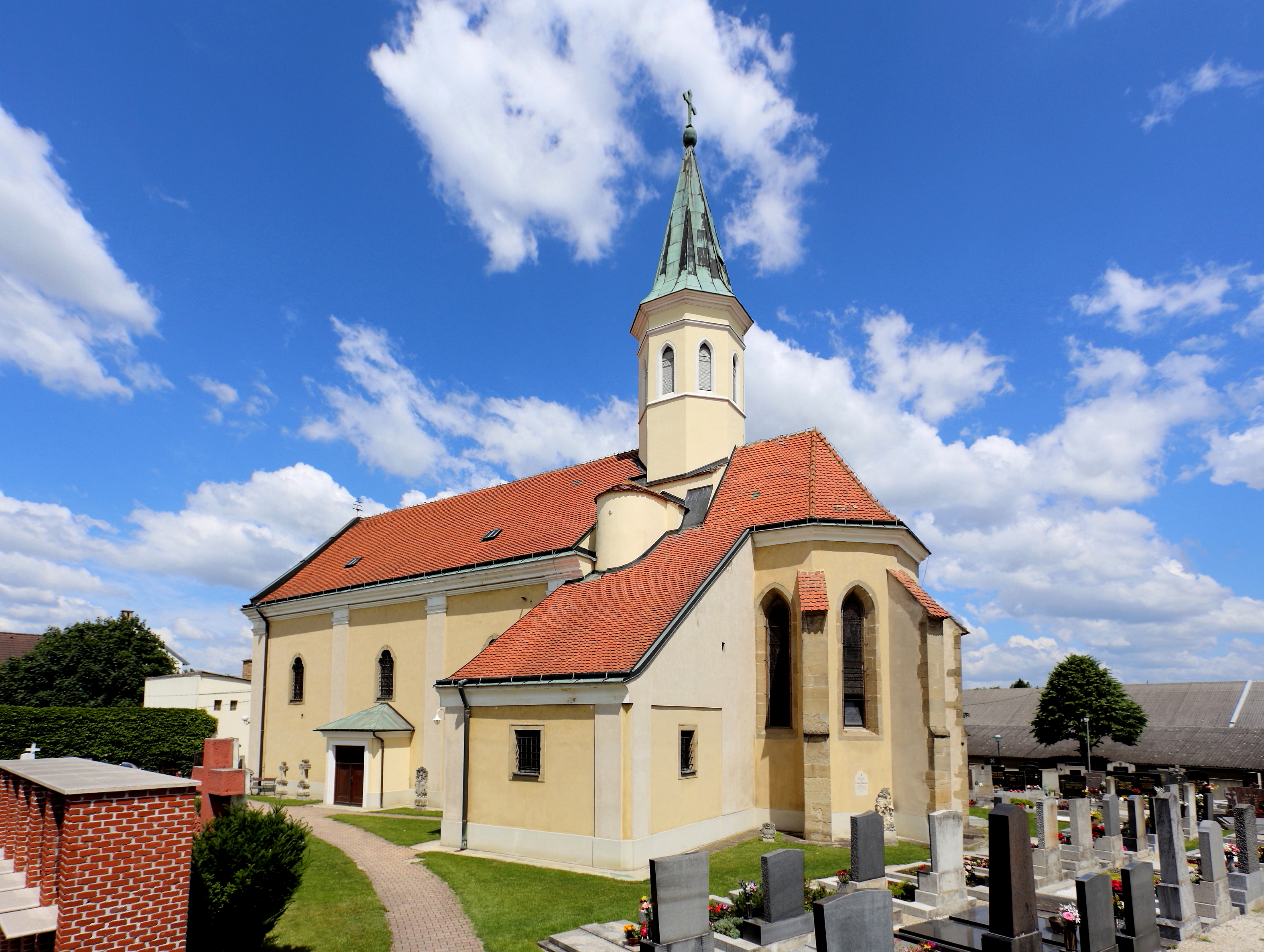 Südostansicht der Pfarrkirche Mariae Himmelfahrt in der niederösterreichischen Gemeinde Markgrafneusiedl. Eine große, im Kern (insbesondere Chor) gotische Kirche, die 1753 im barocken Stil umgebaut wurde (Neuerrichtung des Langhauses?) und von einem Friedhof umgeben ist.